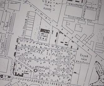 скан из книги 1904 года